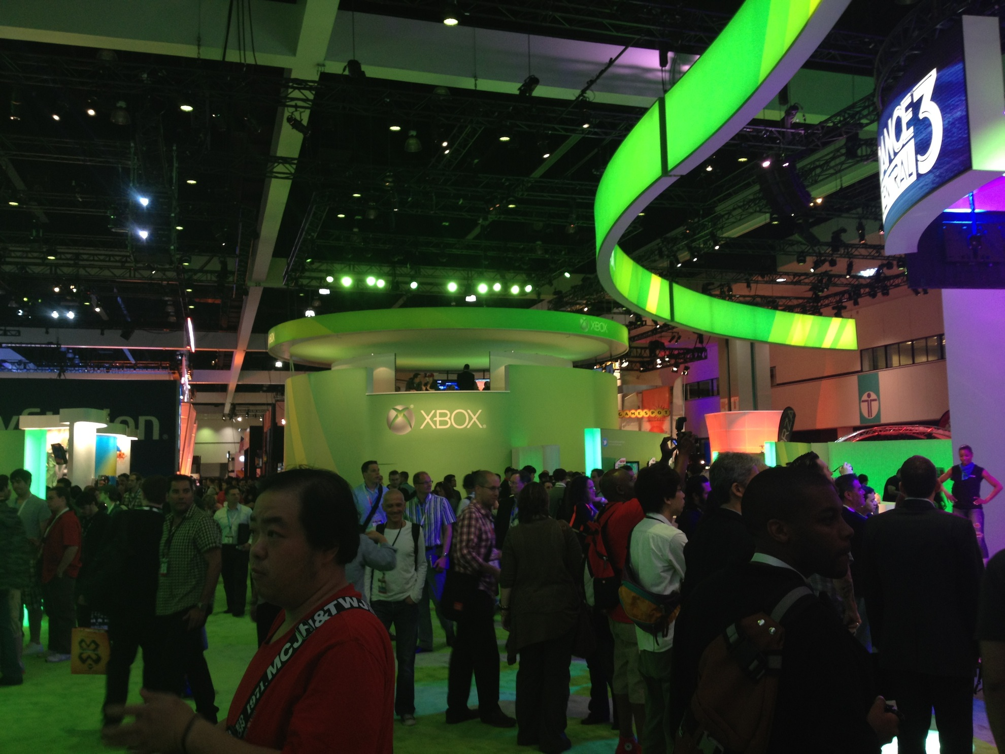 Los Angeles #7